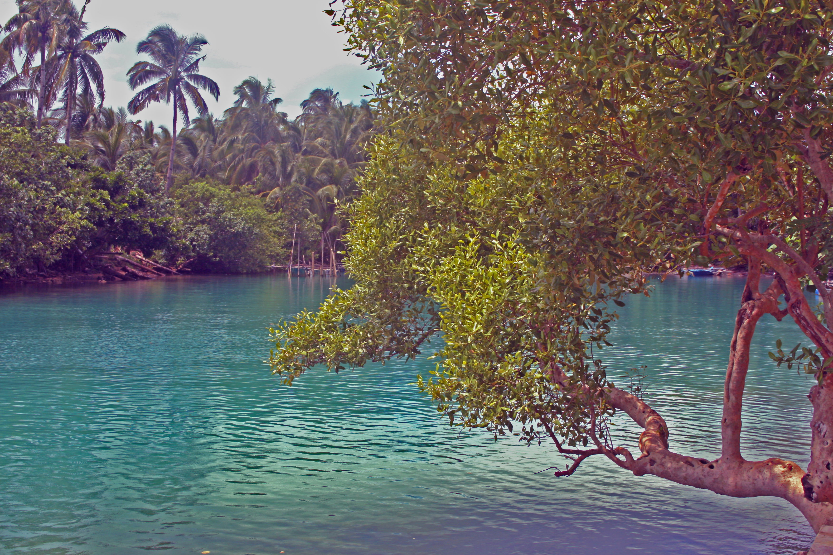 Small Lagoon on Tubabao Island, Guiuan, Eastern Samar